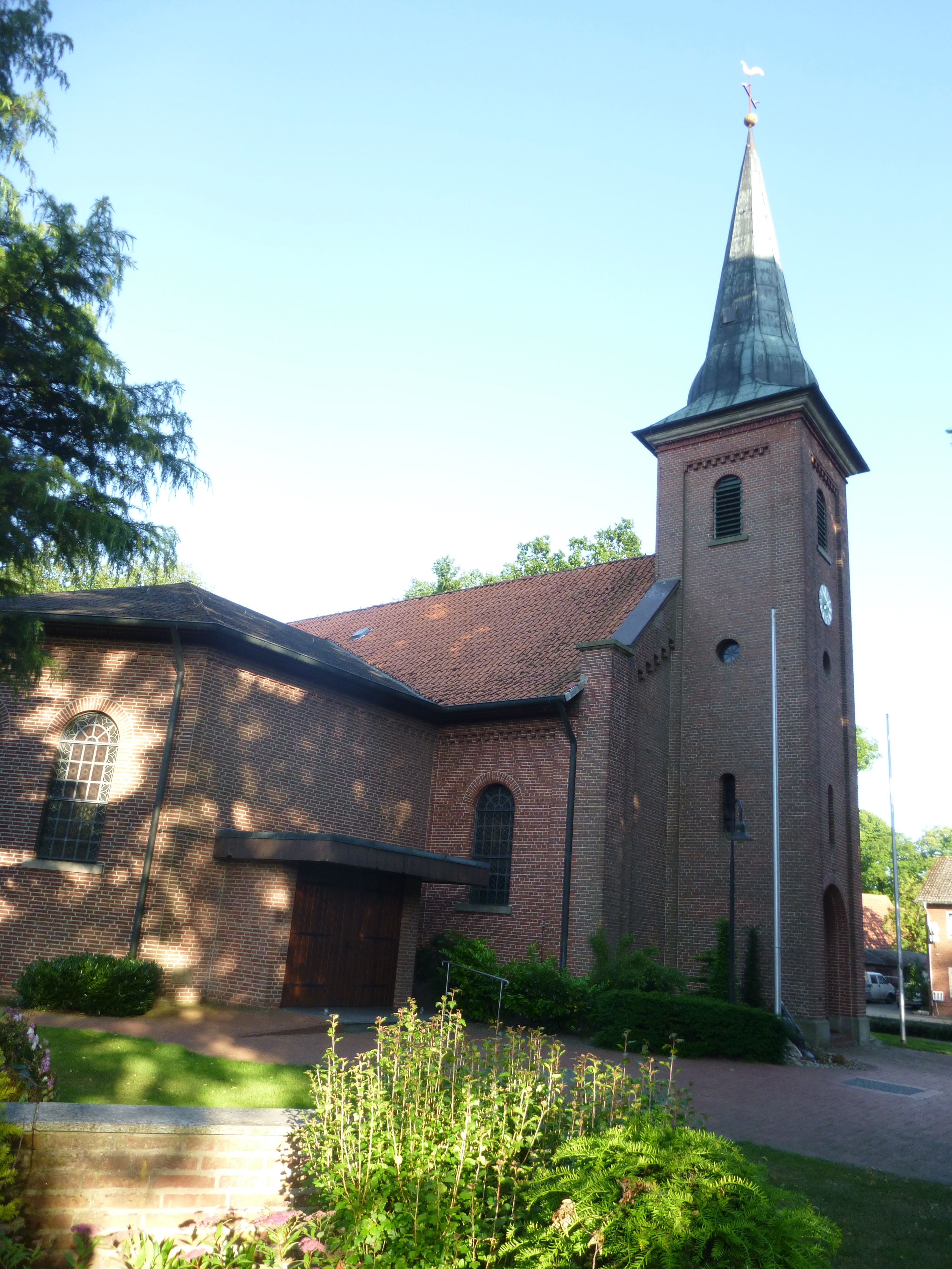 katolika kirko en Lahn, distrikto Emsland, Germanio